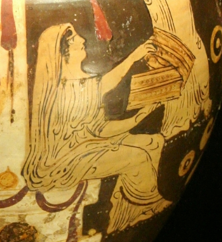 Particolare di questo file caricato su commons: File:Vas grec de figures roges.JPG